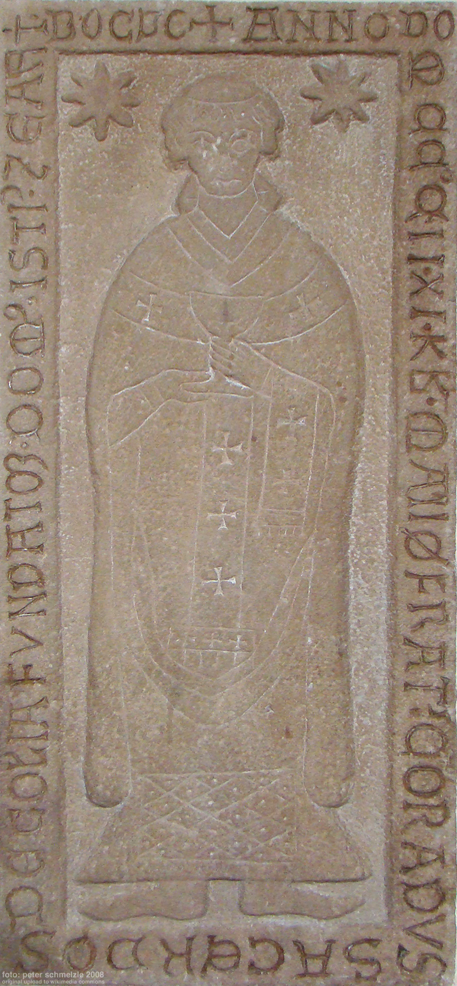 Historische Grabplatte im Tempelhaus in Neckarelz, so genannter "Conradusstein"; siehe Artikel in Badische Heimat, 1952 (PDF)